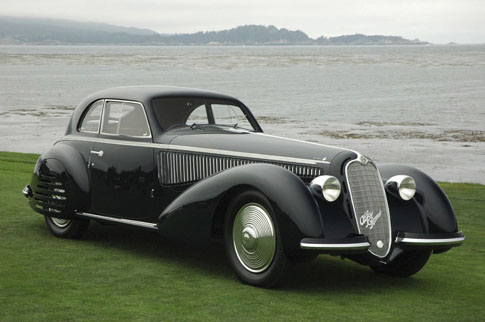 Alfa Romeo 1938 8C 2900B Berlinetta Villa D'Este Concorso d'Eleganza 2009